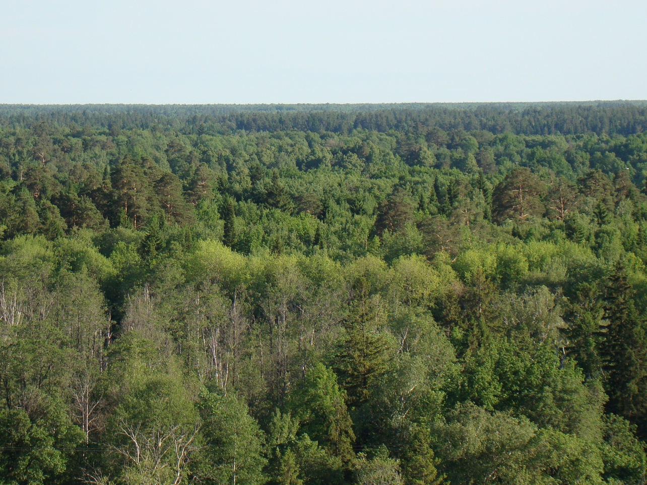 Вид с верхнего этажа дома на ул. К.Либкнехта на лесной массив "Сосновая роща" на юго-востоке города Йошкар-Ола.